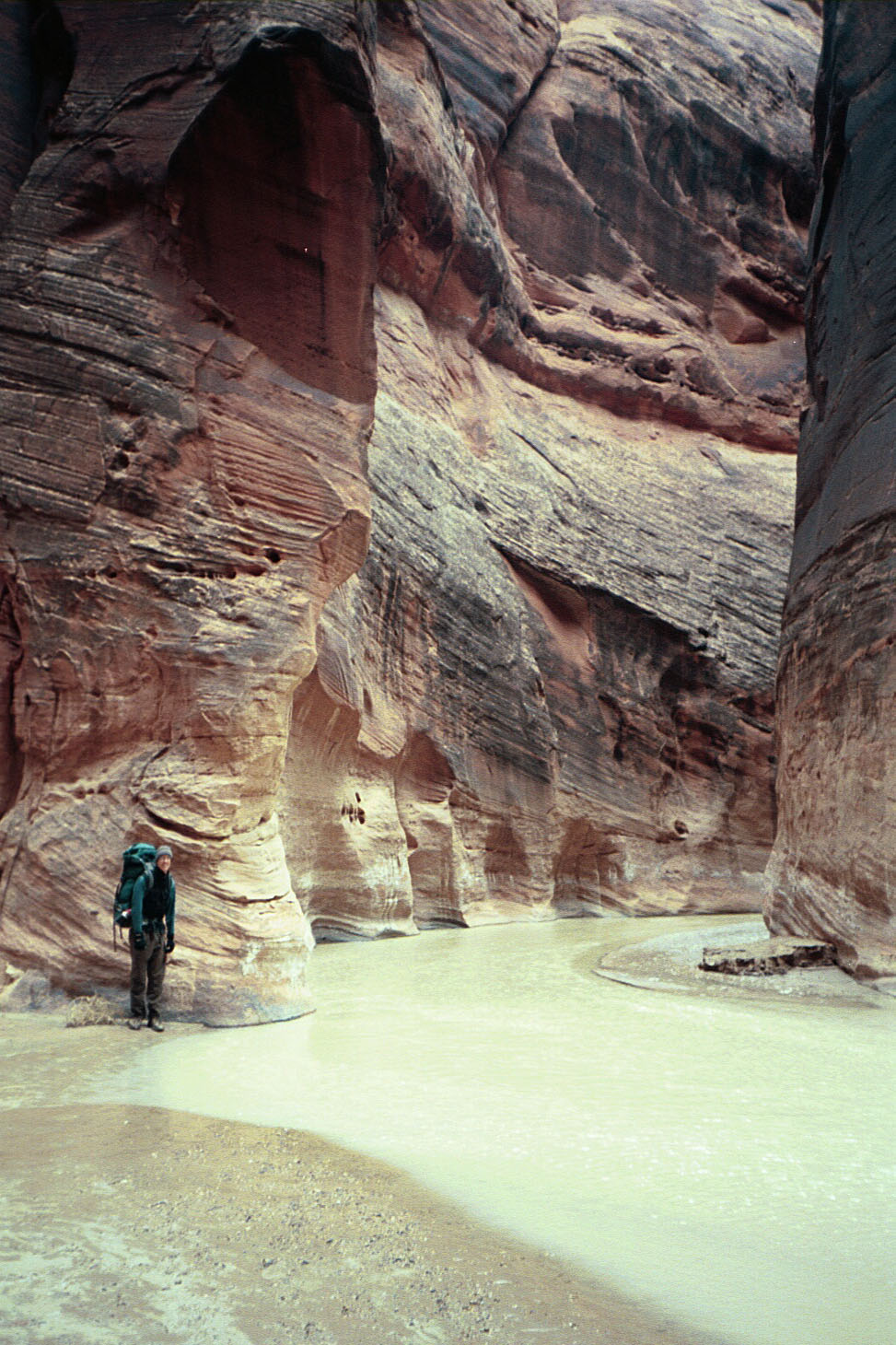 Río Paria